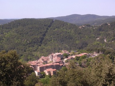 Village de Claviers, Var